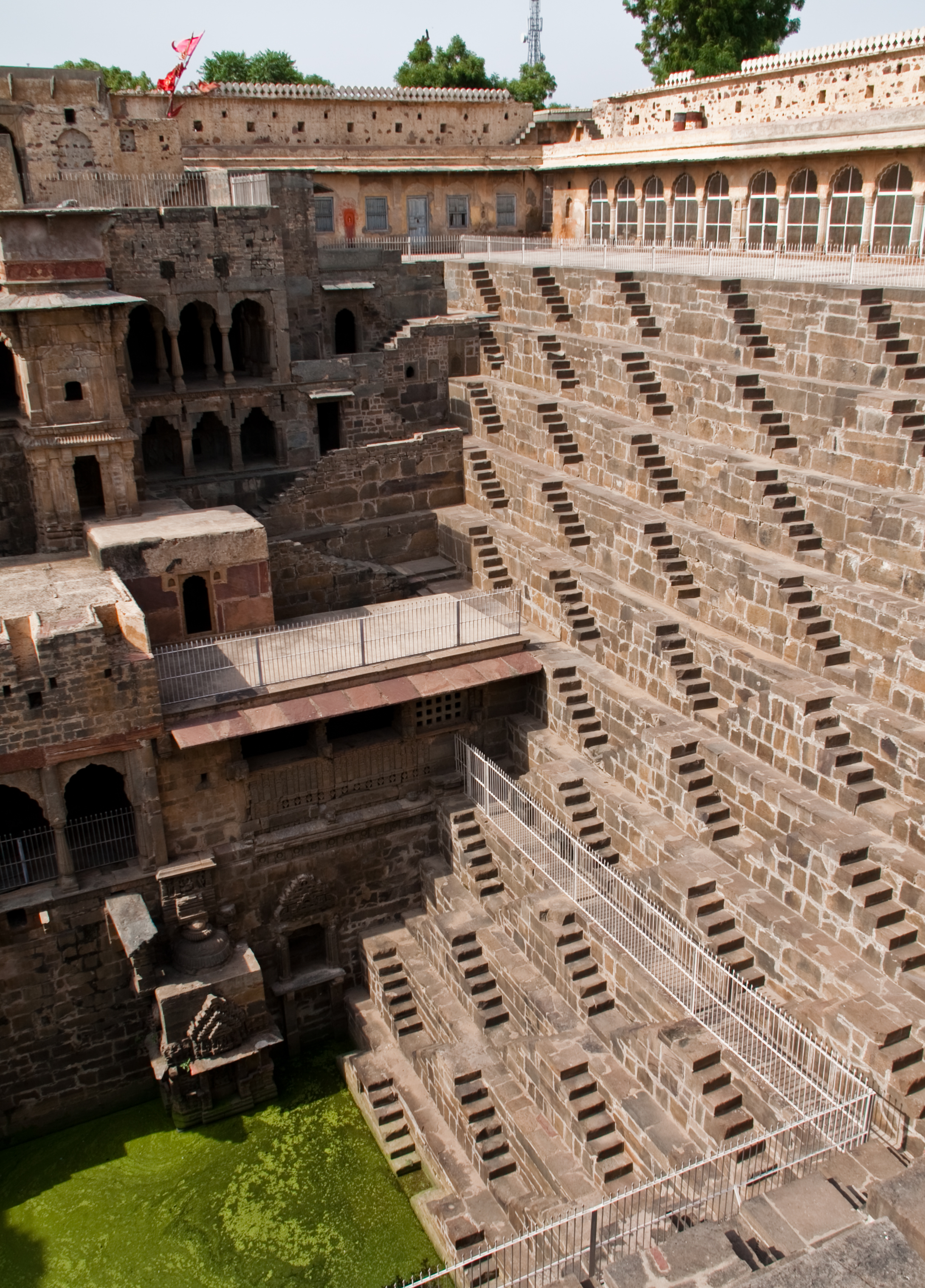 Abhaneri Step Well